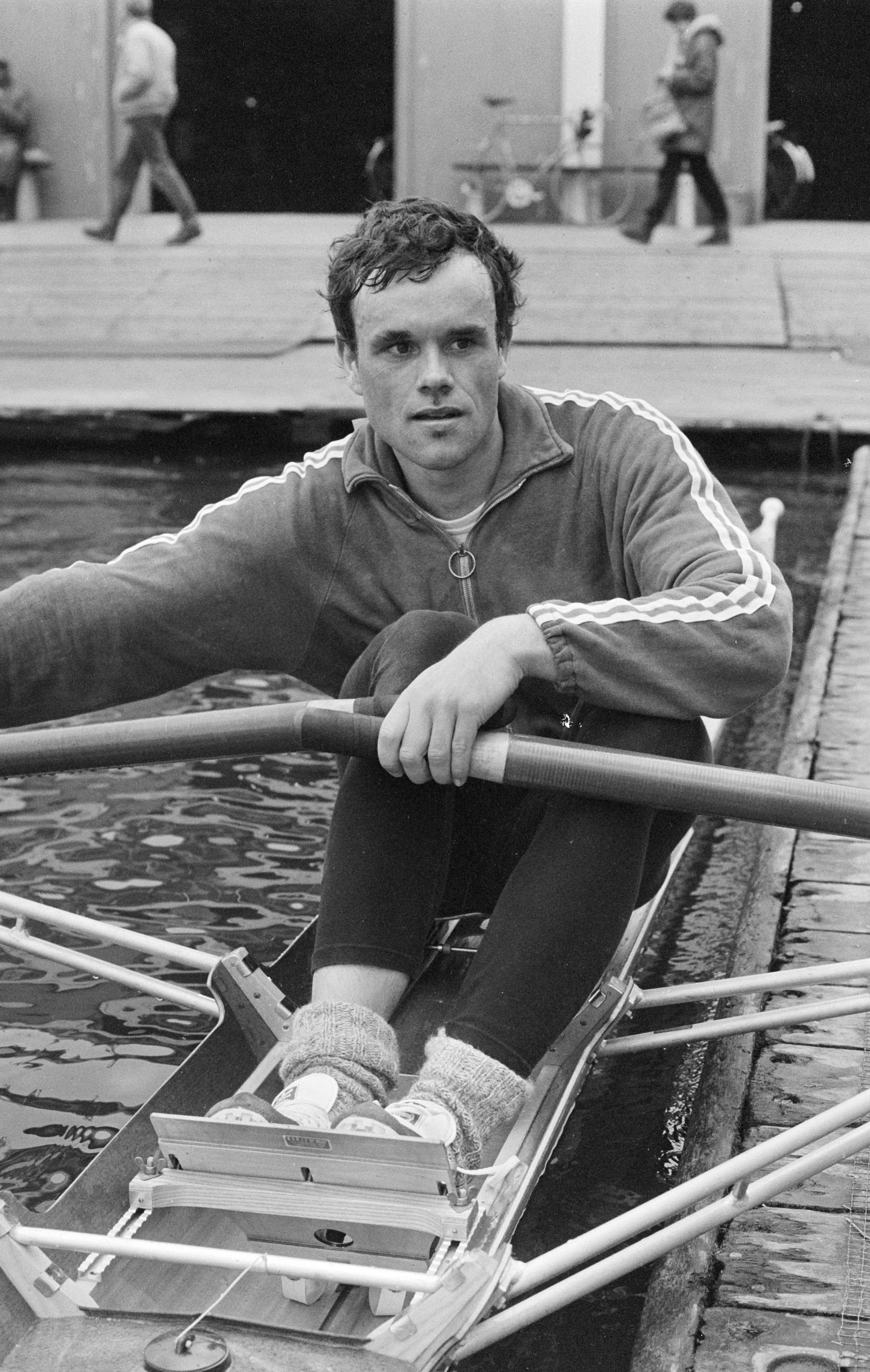 Roeien: Skifhead '84; skiffeur Frans Gobel na afloop